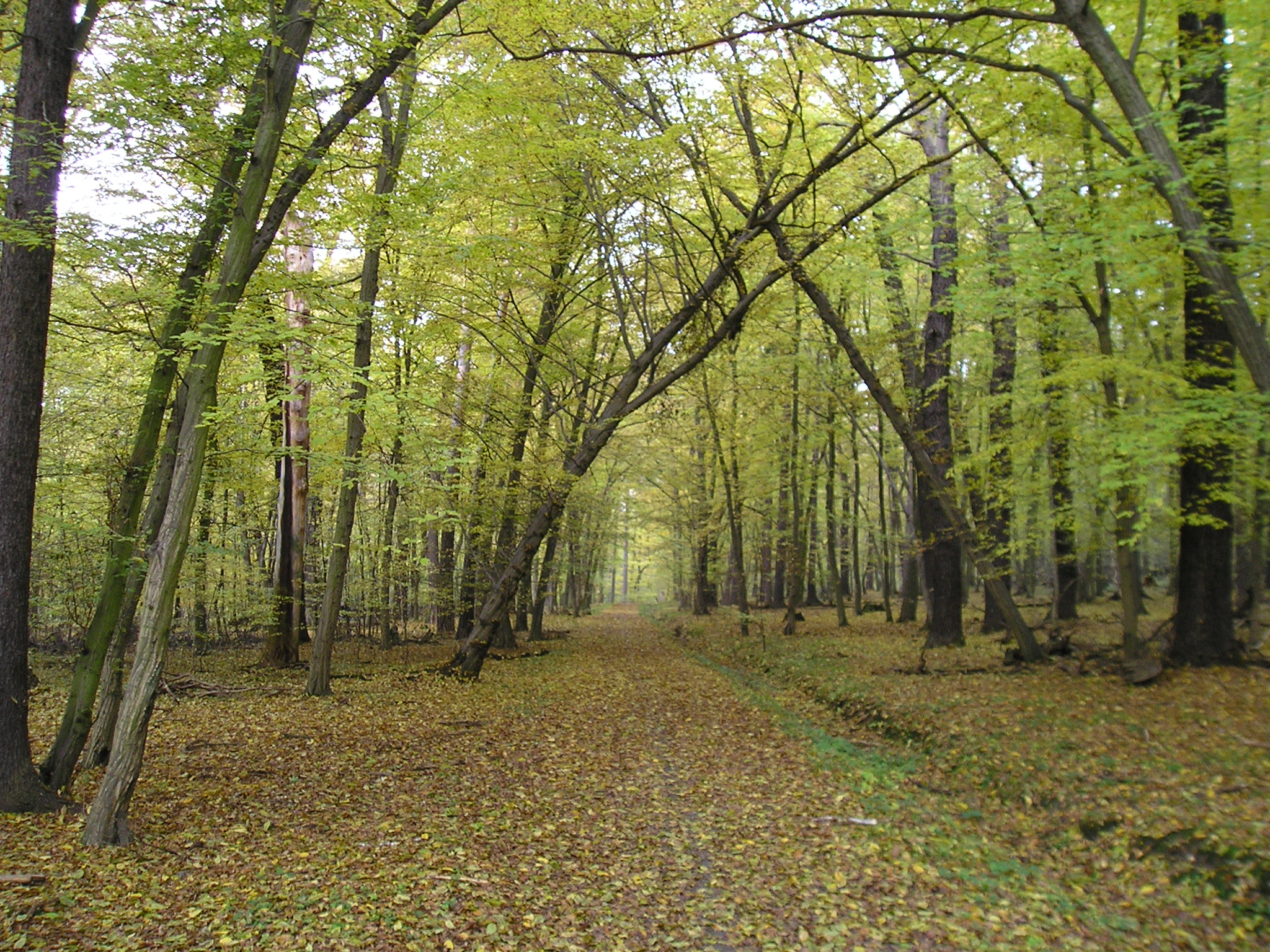 Turistická a naučná stezka probíhací skrze přírodní rezervaci Zábělá.